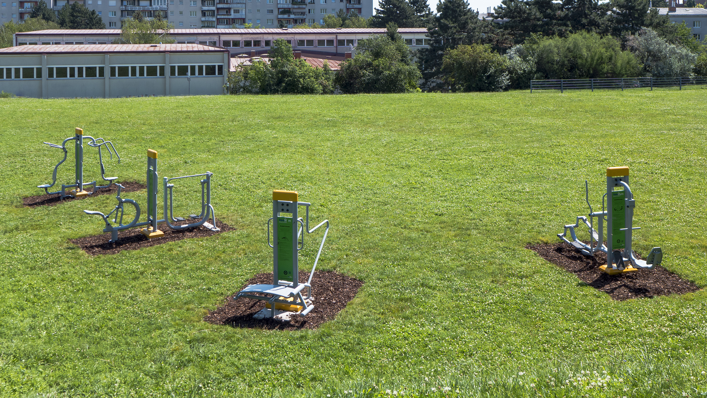 Fridtjof-Nansen-Park in Wien 23